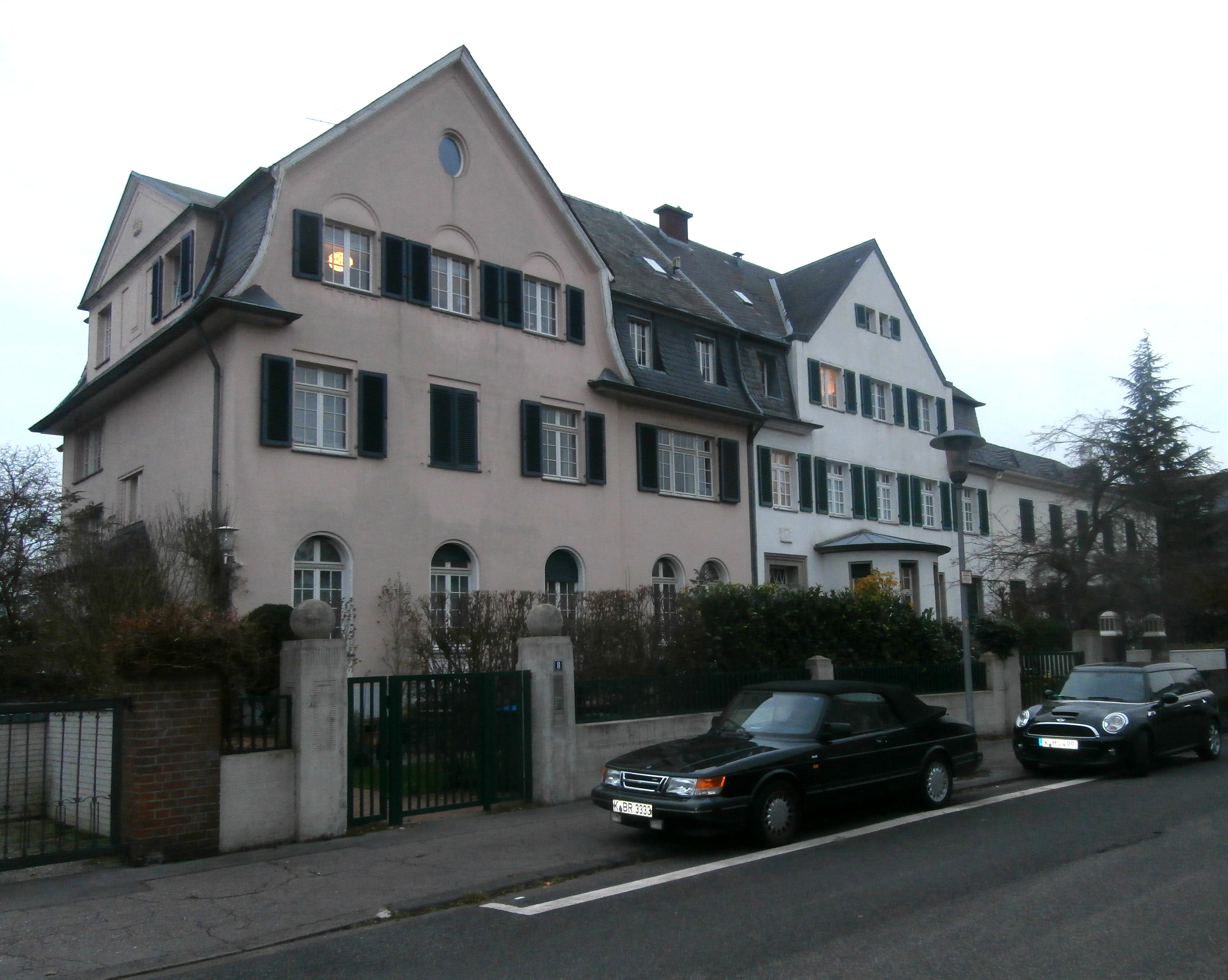 Denkmalgeschützte Wohnhäuser, Max-Bruch-Straße 4–8 (v.r.n.l.), Köln-Lindenthal